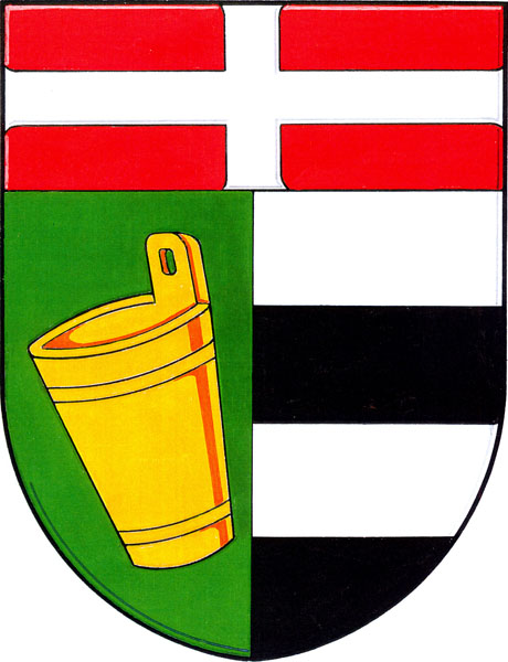 Znak obce Roštění